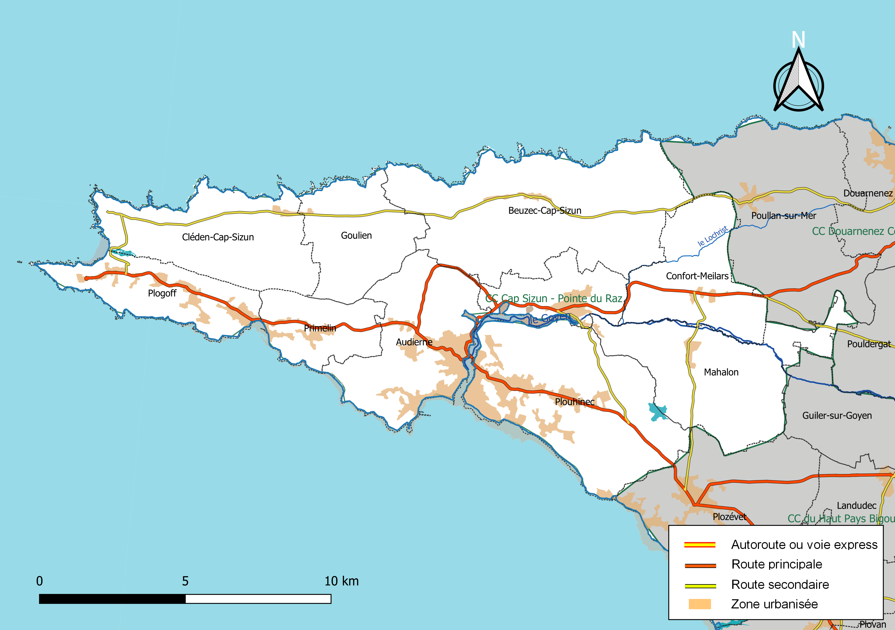 Carte géographique de la Communauté de communes Cap Sizun - Pointe du Raz, département du Finistère, France. Composition au 1er janvier 2019.